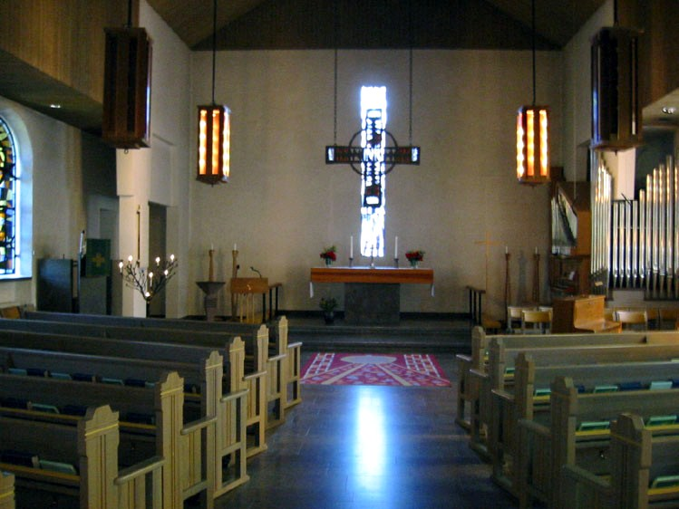 Borgholms kyrka.Interiör.